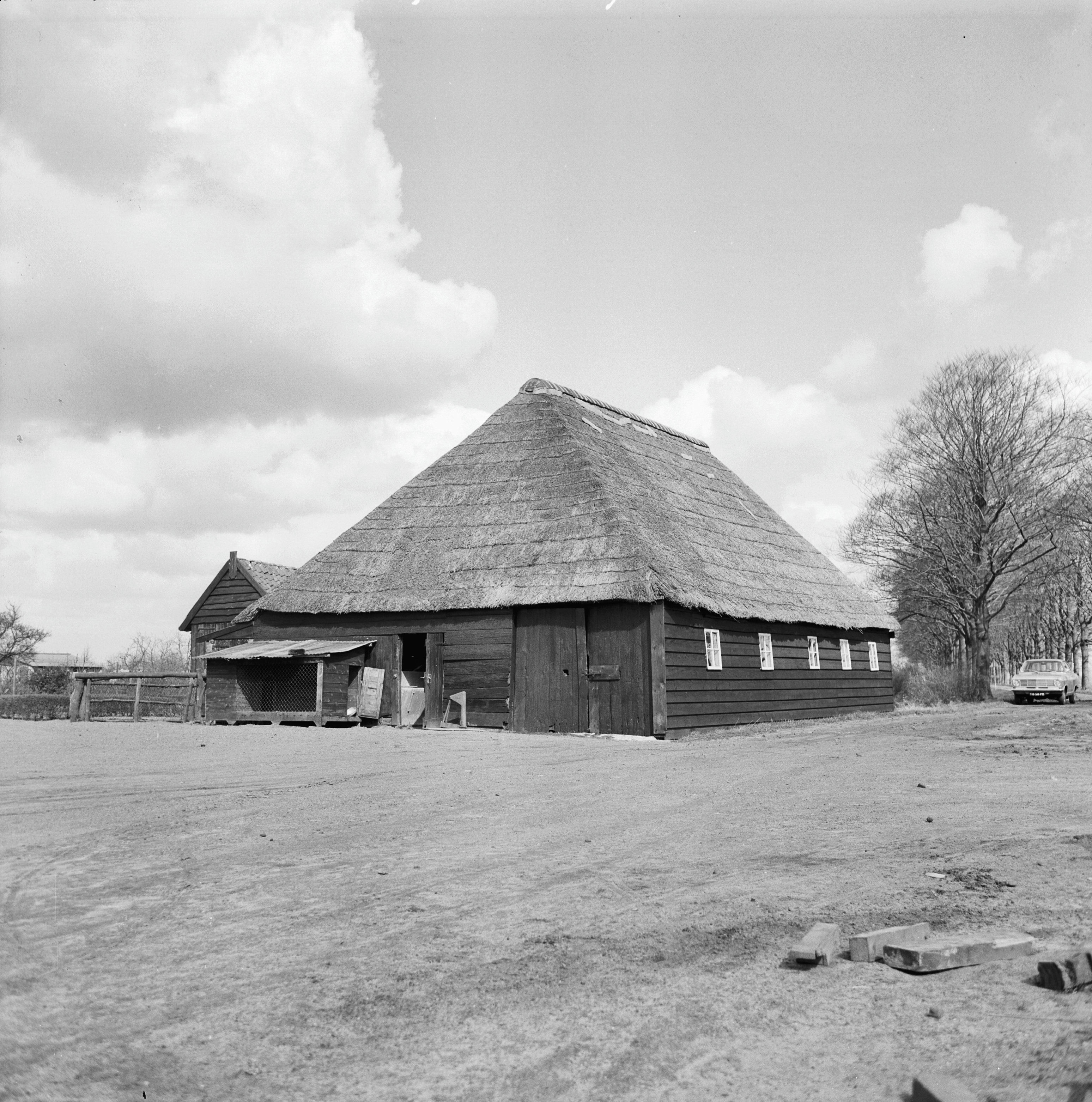 schuur